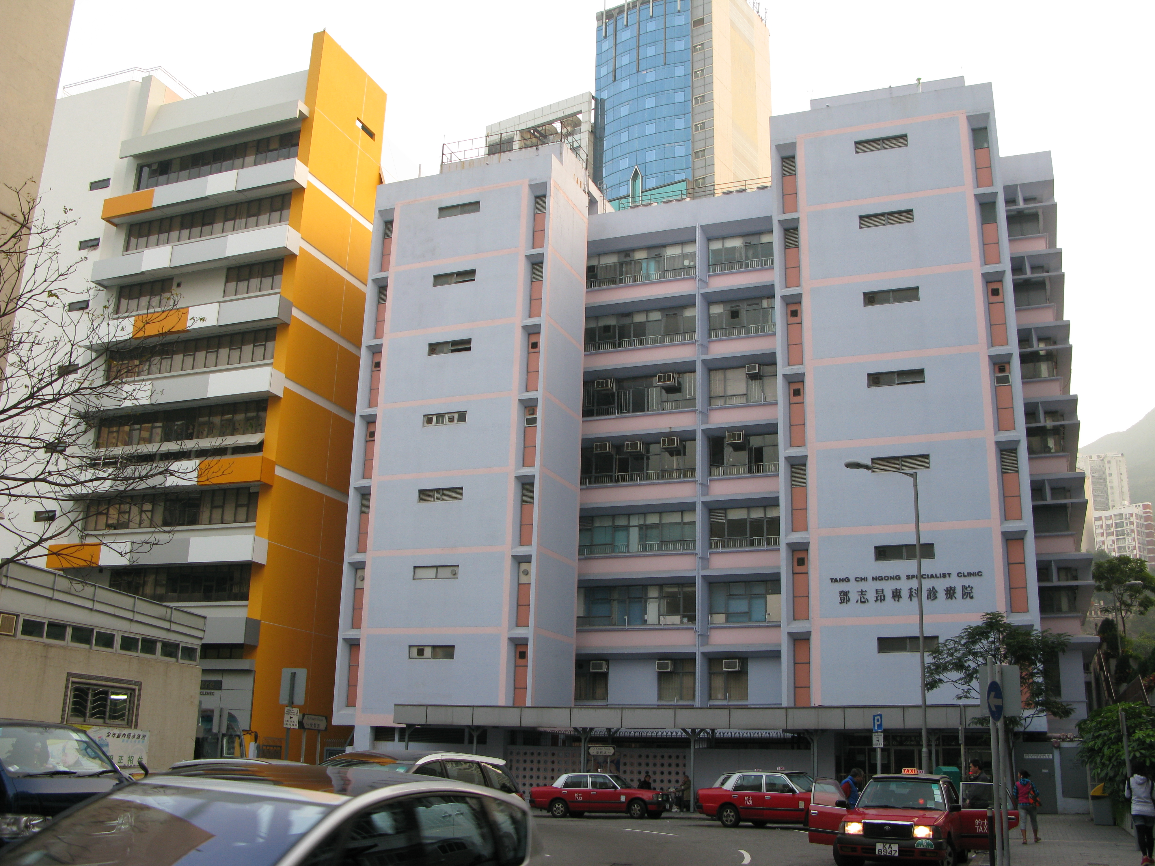 中文（香港）: 香港灣仔摩理臣山鄧志昂專科診療院